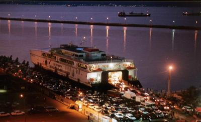 bandırma ulaşım ido